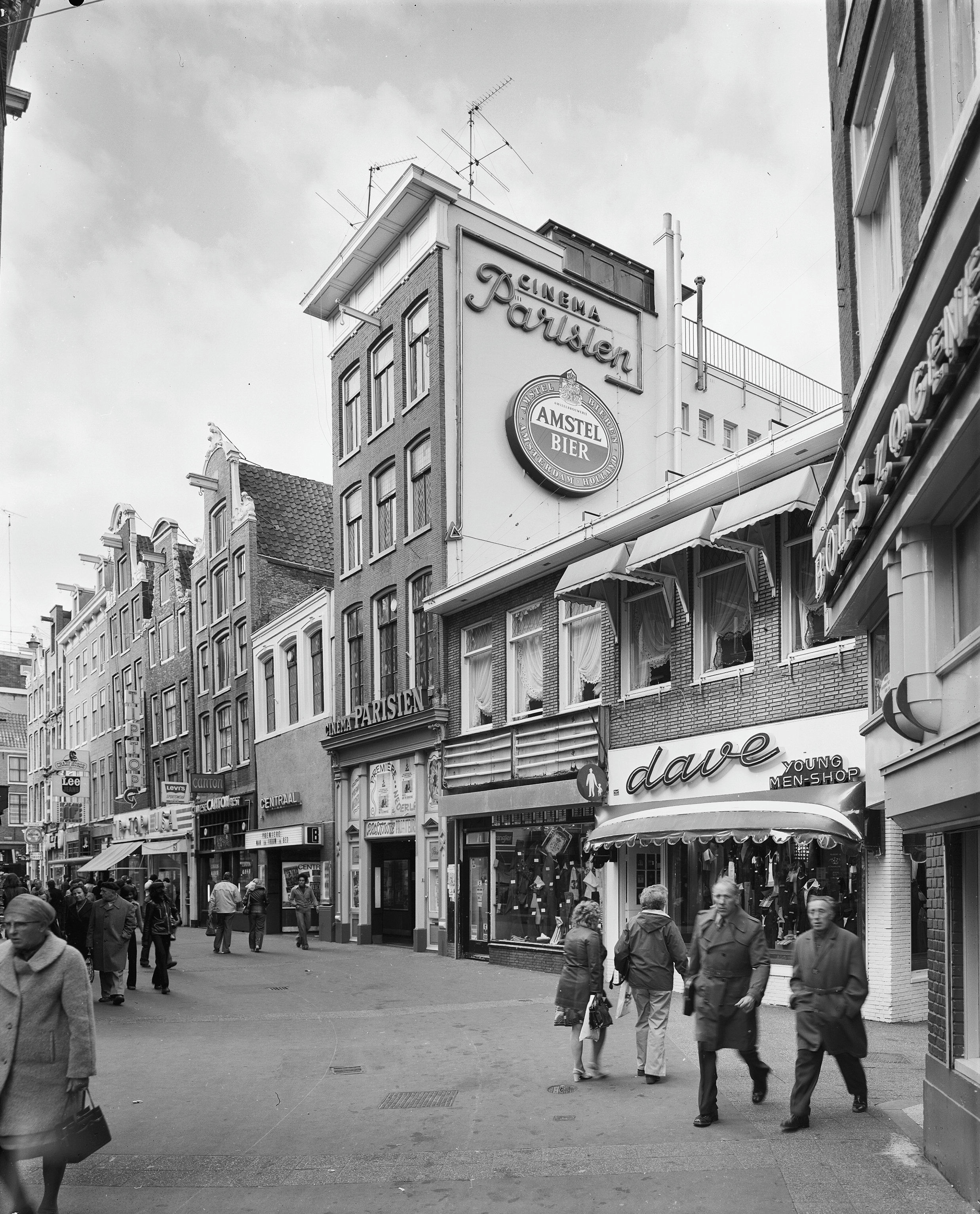 CINEMA PARISIEN: voorgevel